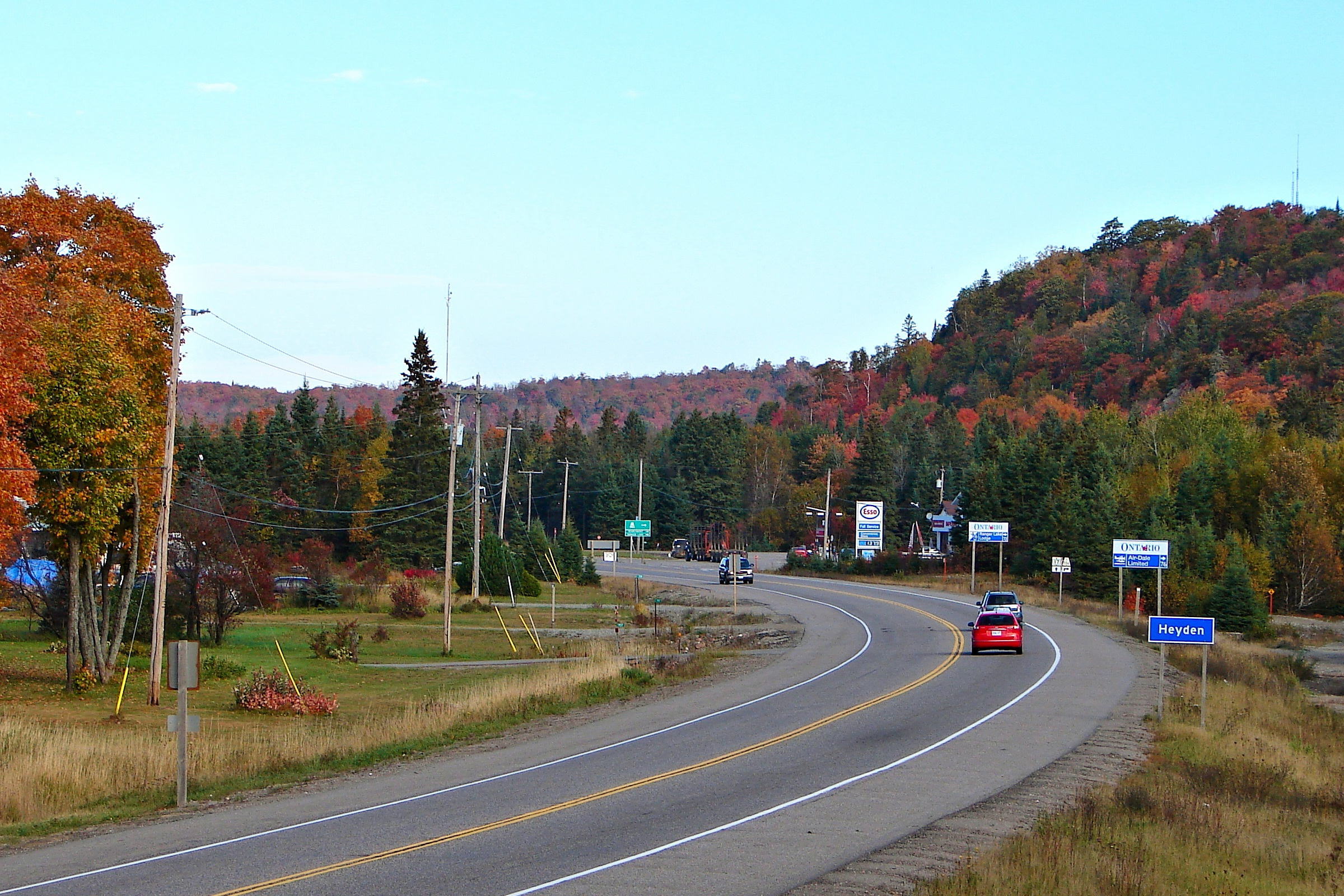 Heyden, Ontario, Canada